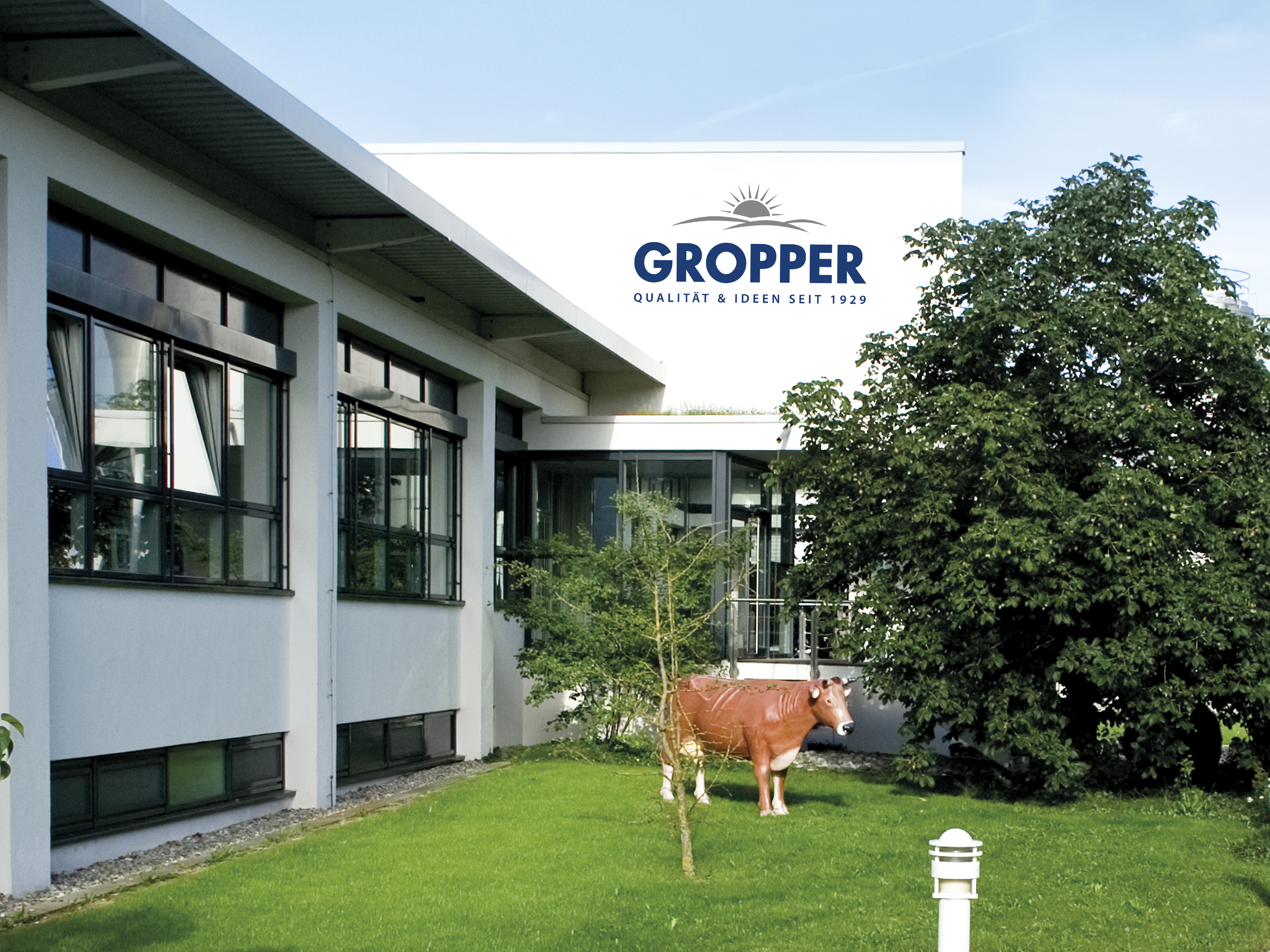 Haupteingang Molkerei Gropper in Bissingen